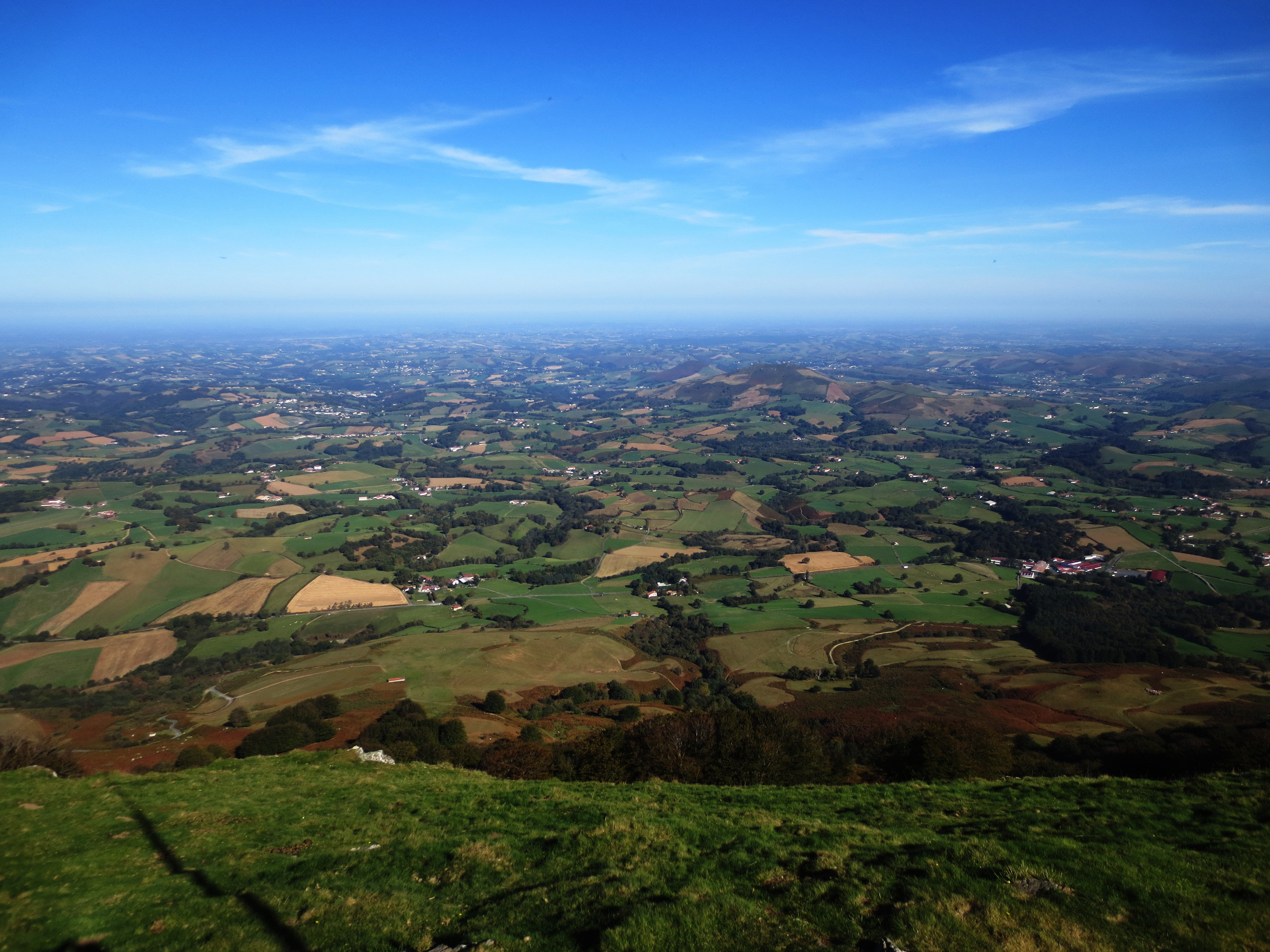 Lapurdi Baiguratik, Euskal Herria